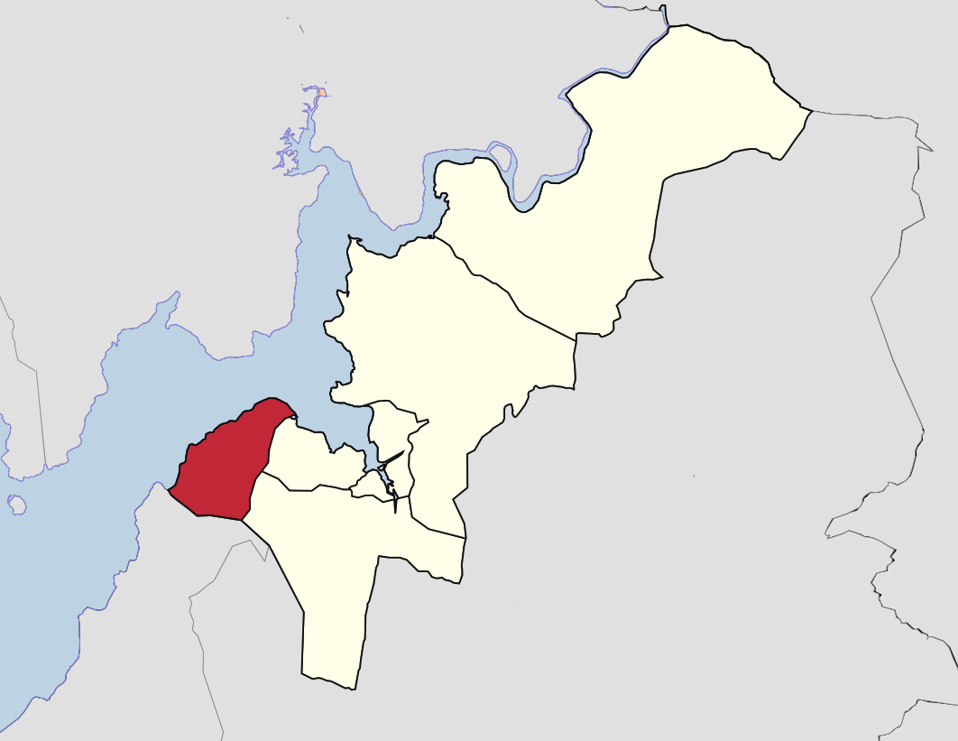 Parroquia de San Pedro de Boa en Noia